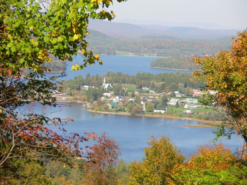 Notre-Dame-de-Pontmain (Québec) vue de la Montagne